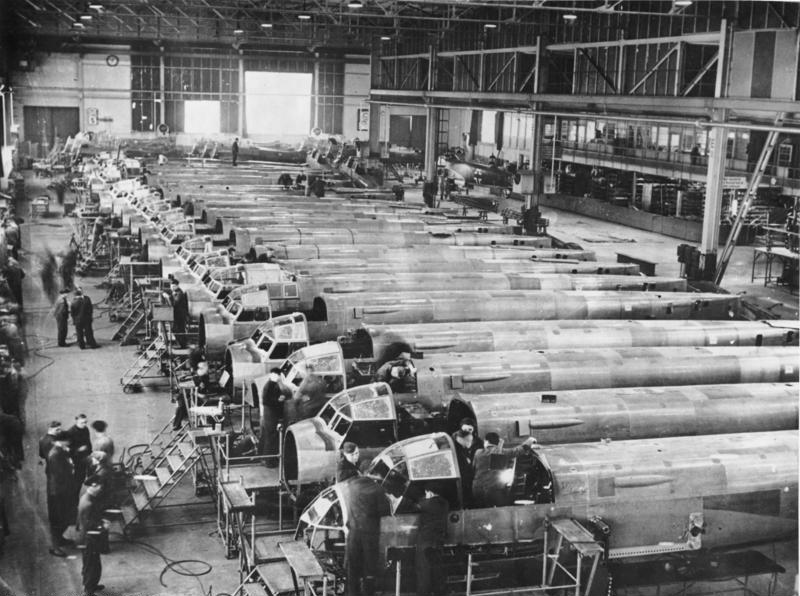 Der Einflieger erprobt "V I" Die neue Flugzeugtype hat alle Gewaltproben, die ihr der Einflieger zumuten musste, überstanden und sich als volltauglich erwiesen. Die Fabrikation in Großserie kann erfolgen. Flugzeug um Flugzeug verläßt täglich die großen Werke, um dem Feind immer von neuem zu zeigen, daß er mit einem Geringerwerden des deutschen Rüstungspotentials nicht zu rechnen hat.